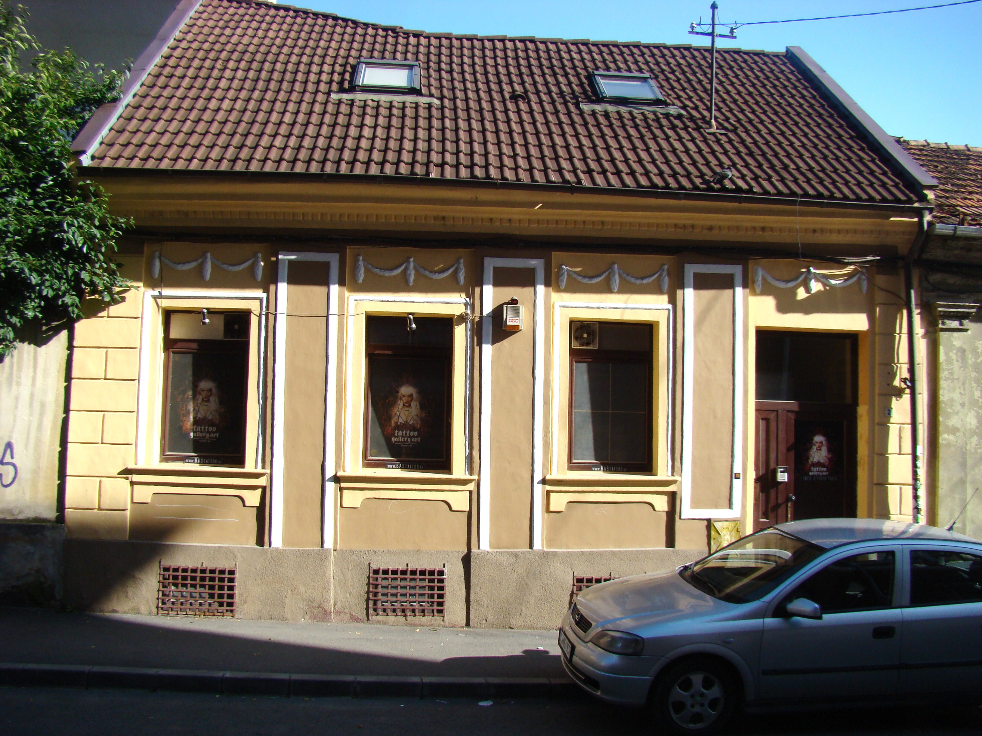 Casă monument, str.Daicoviciu, nr.3